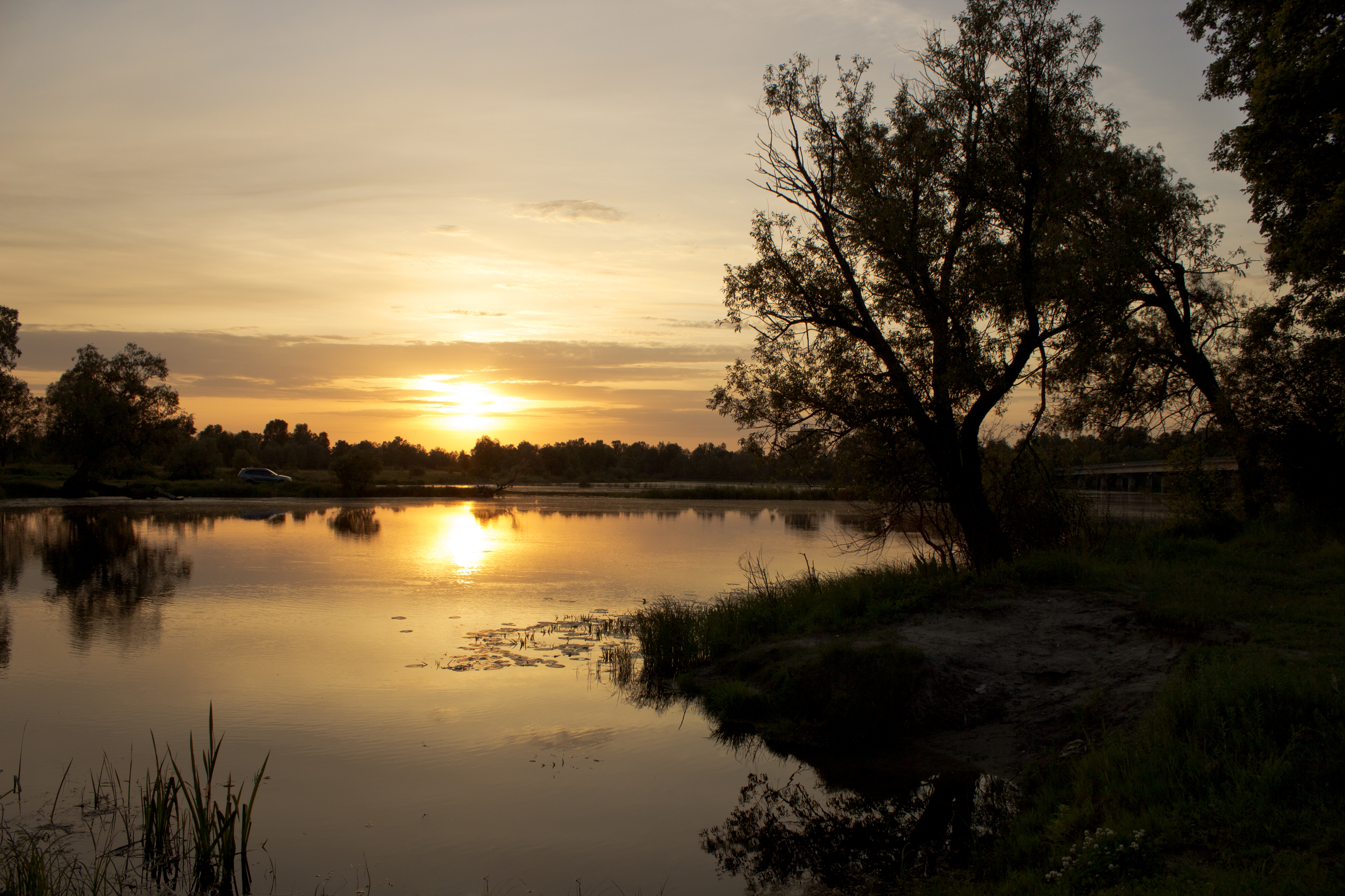 Солонецкое озеро. Закат.